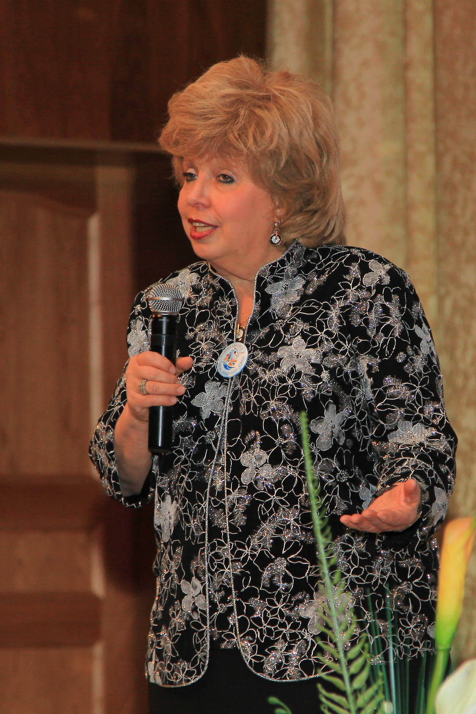 Творческий вечер Ларисы Рубальской в ЦКиОМ города Северодвинска